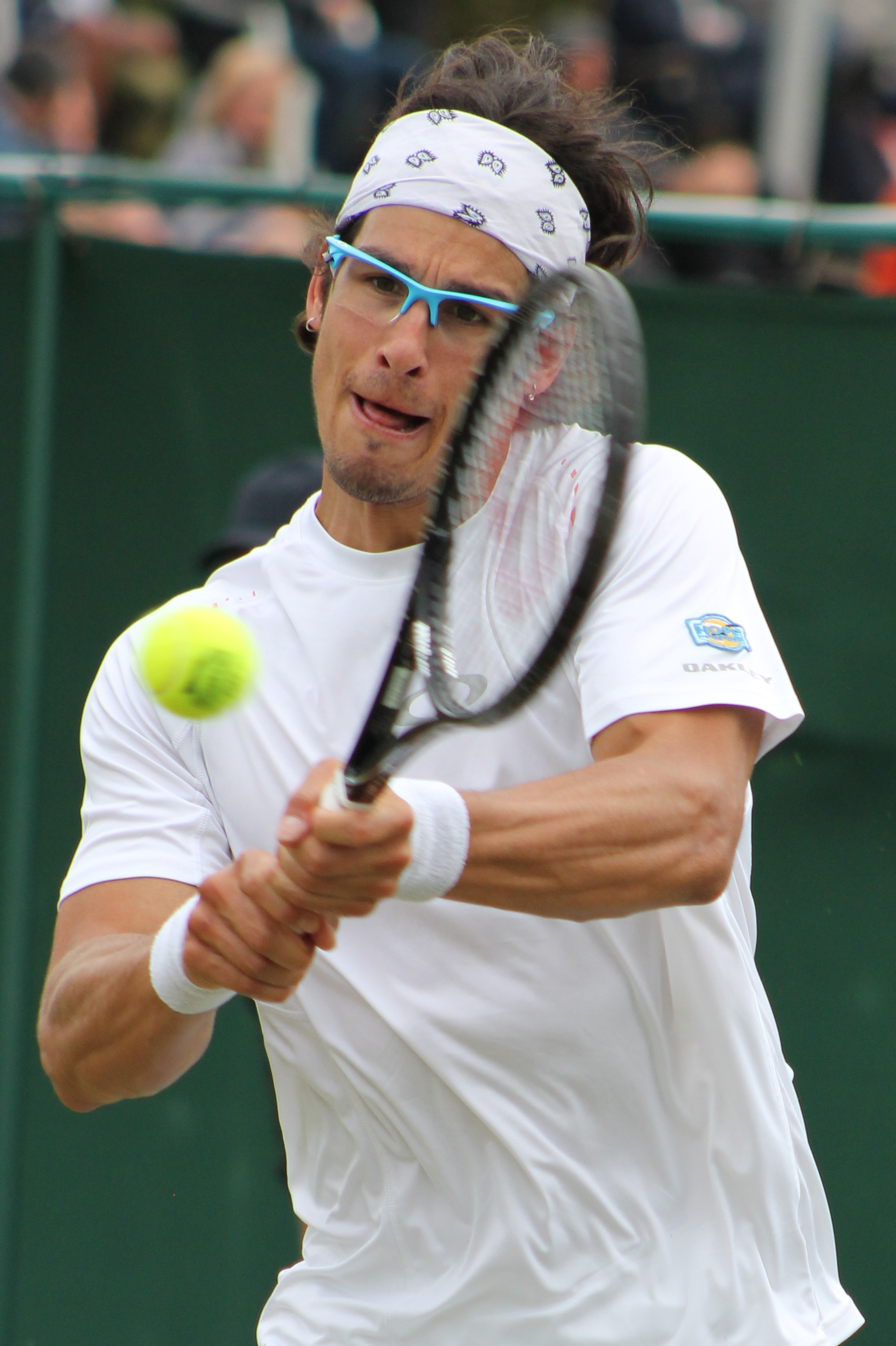 Bozoljac WMQ14 (5)